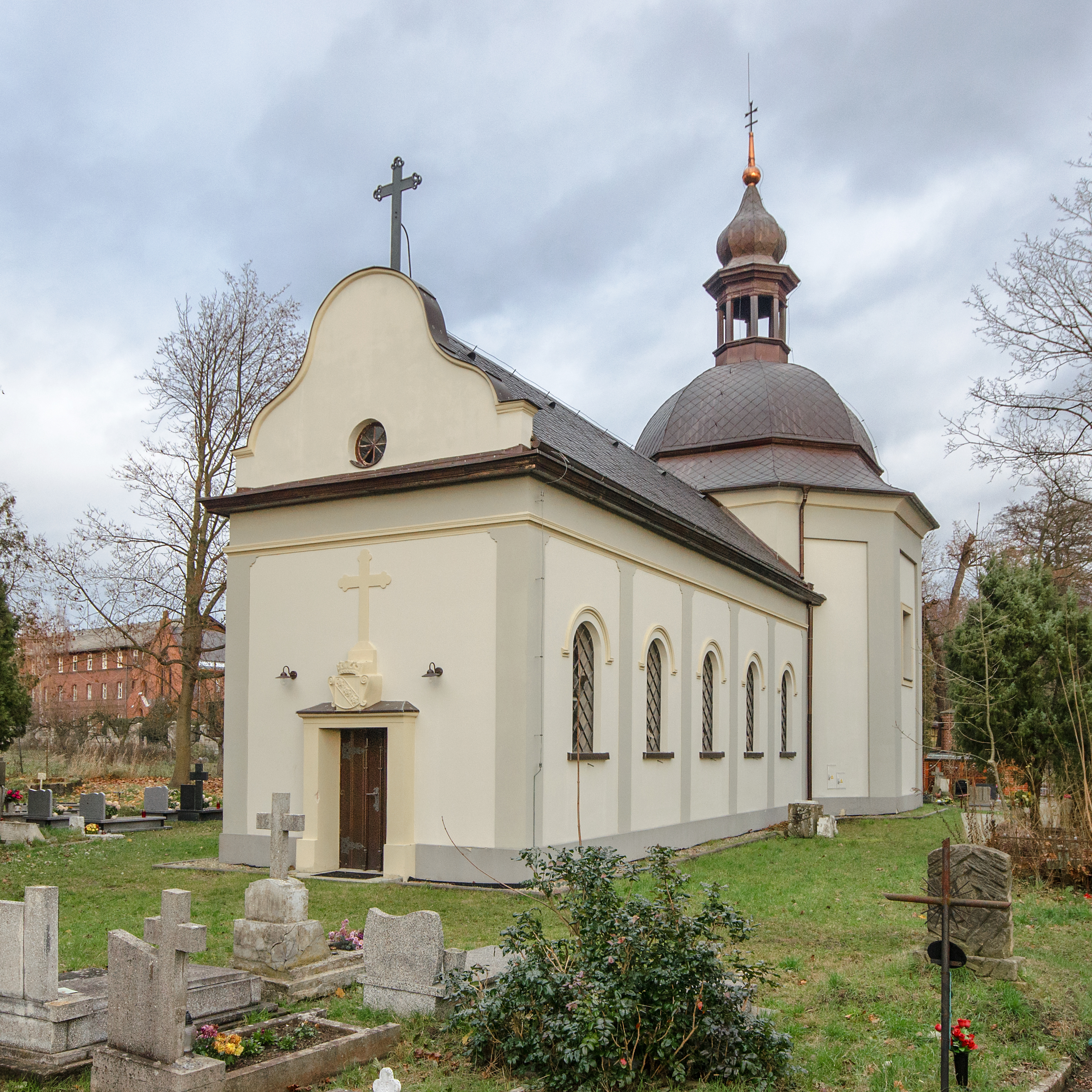 Brzeg Dolny, kaplica p.w. św. Jadwigi, 1660, XIX